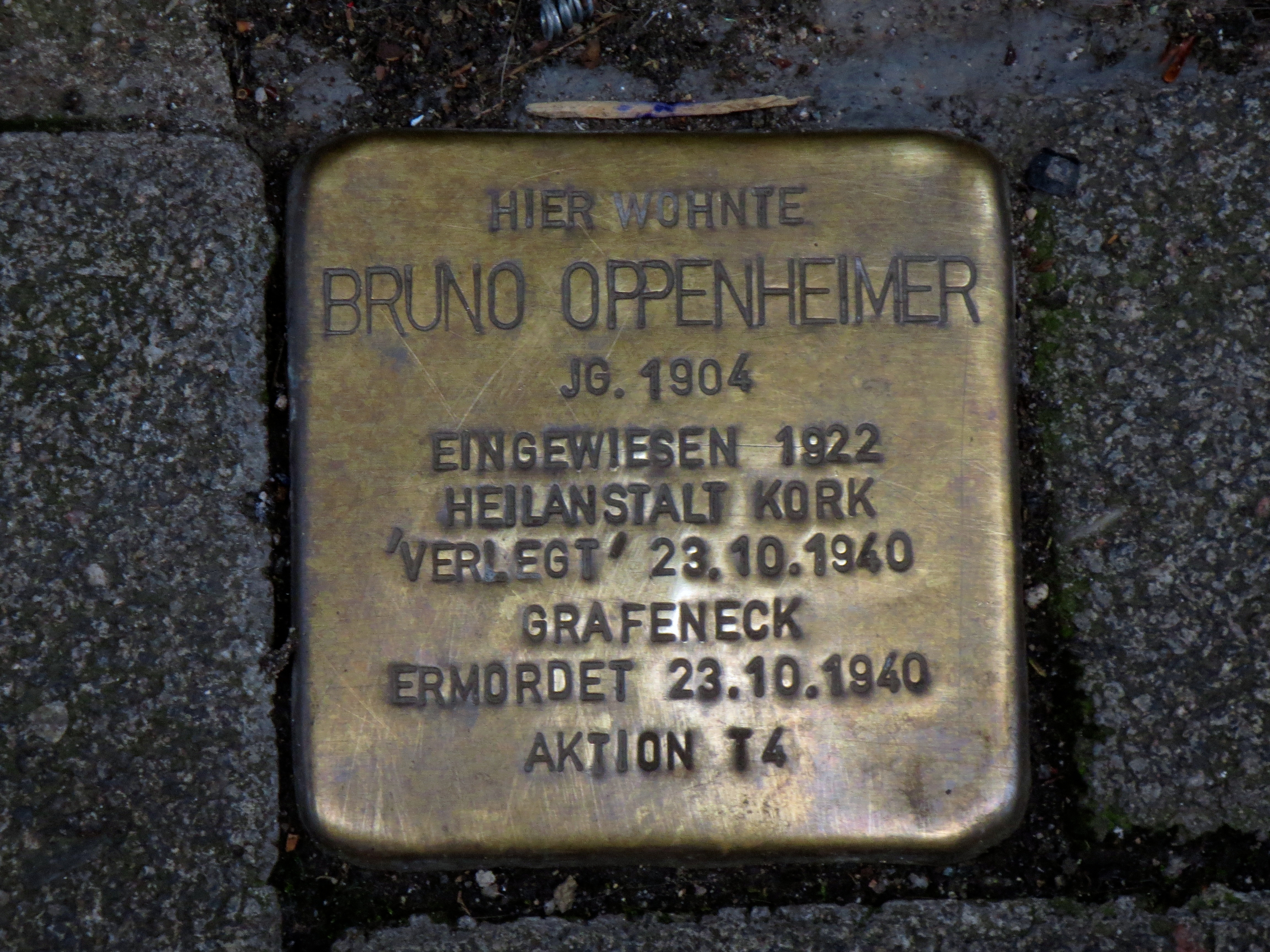 Stolperstein für Bruno Oppenheimer vor seinem Elternhaus, dem heutigen Eingang zum KFG Sophienstraße 1 in Heidelberg, und ehemaligen Anwesen der Familie Oppenheimer